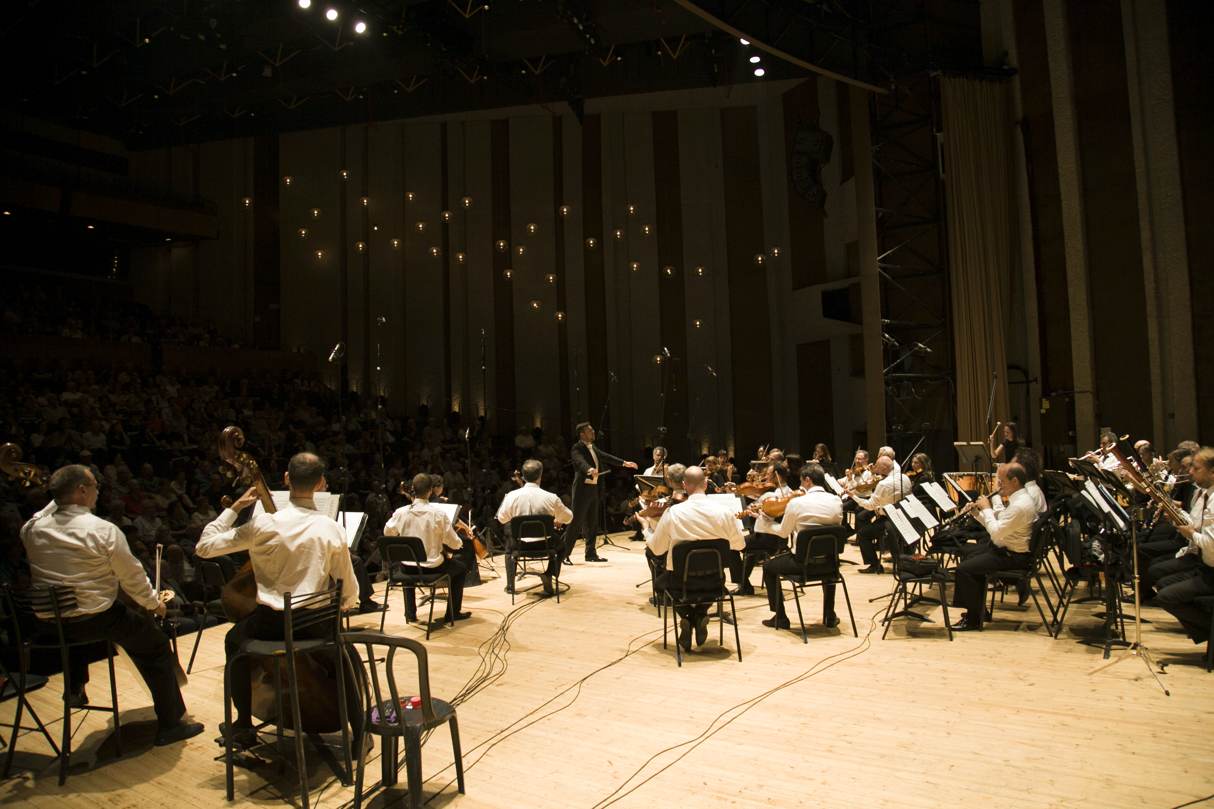 המנצח אלכסנדר ברנשטיין והקאמרטה הישראלית ירושלים בביצוע הסימפוניה השביעית של בטהובן